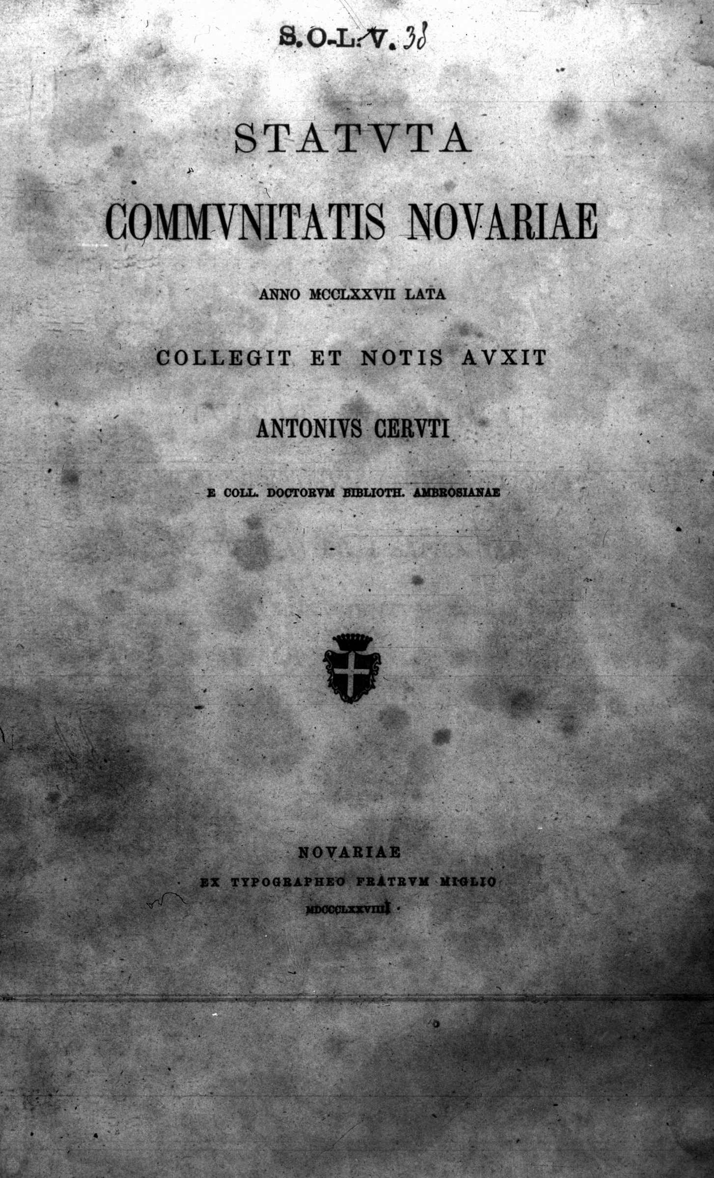 Frontespizio